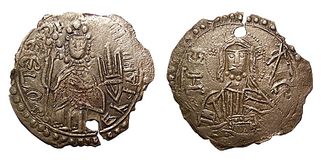 Сребреник великого Киевского князя Владимира I Святого. X-XI вв. н.э. Слева изображение князя Владимира, справа — образ Христа, согласно византийским прототипам.